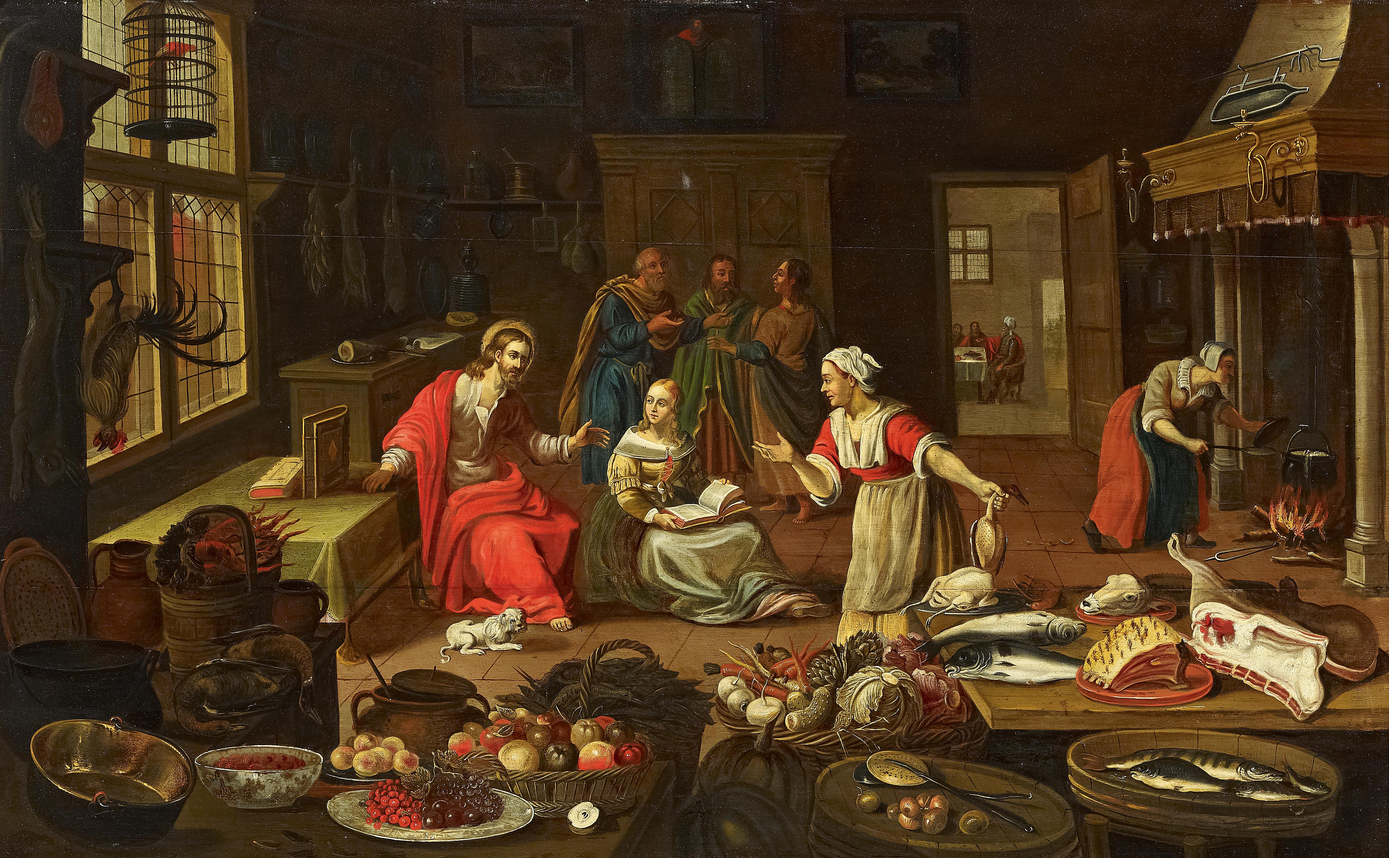 Christus im Hause der Martha. Öl auf Eichenholz. 91 x 146,5 cm.